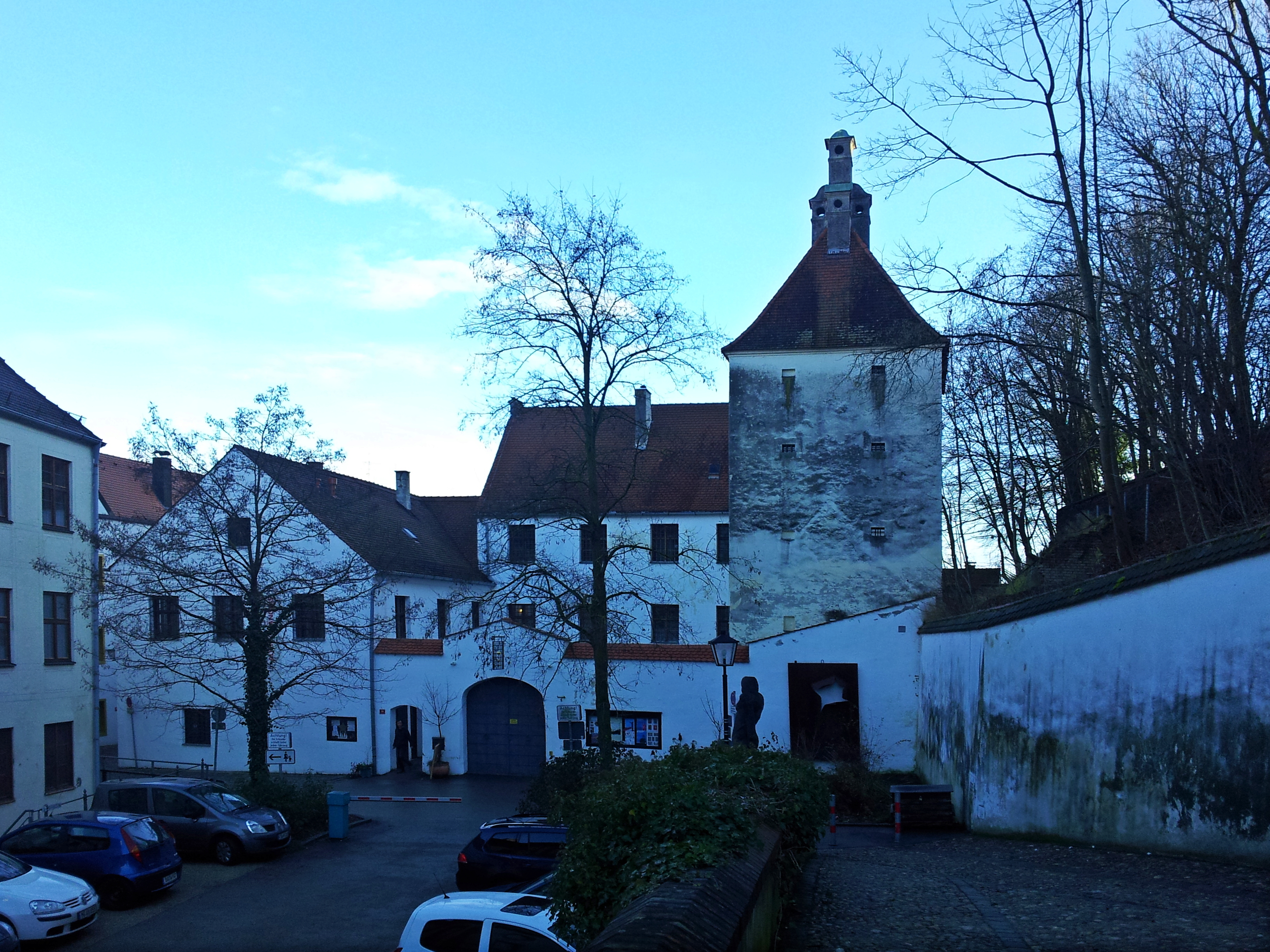 Altes Gefängnis in Freising